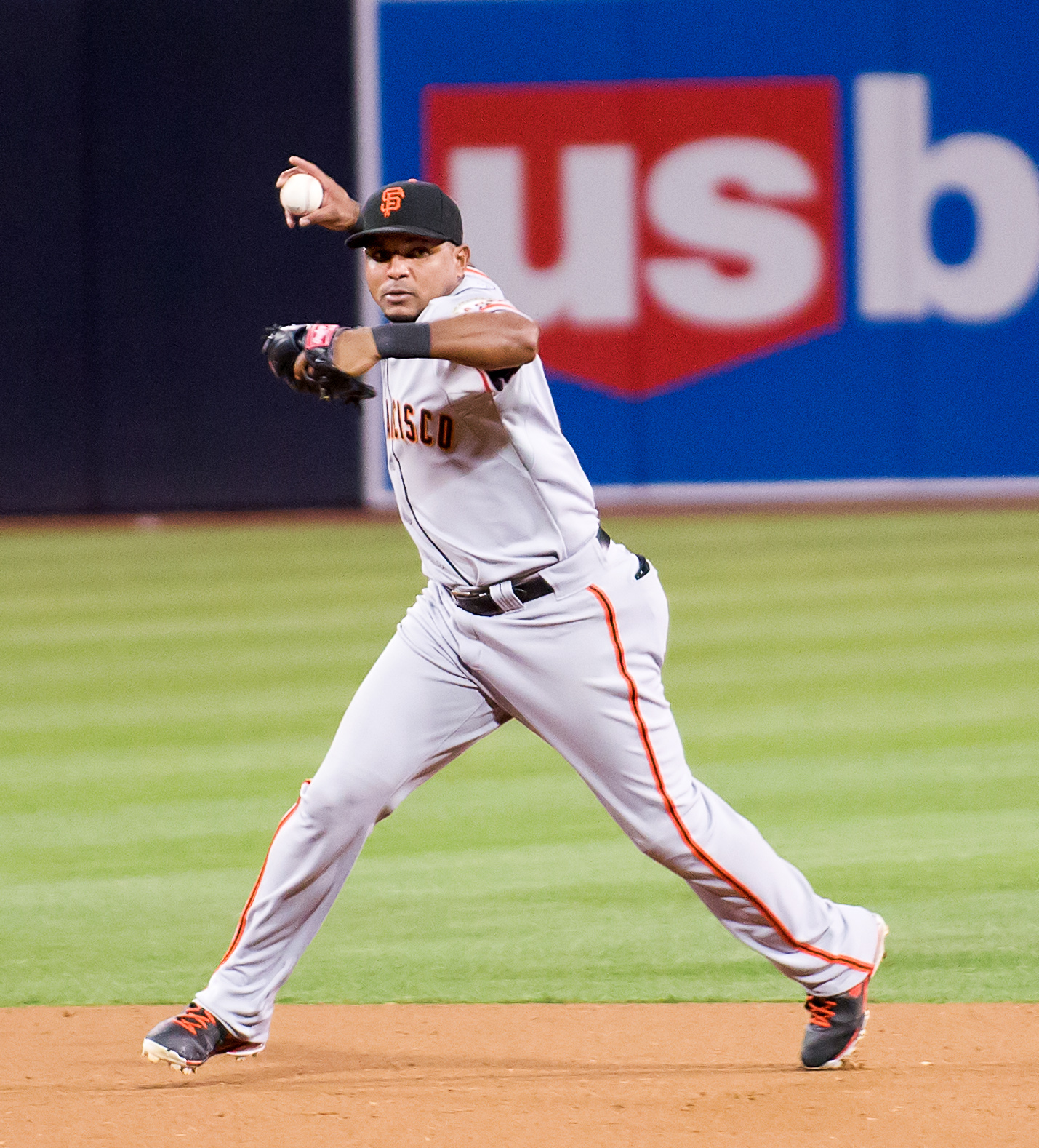 Tony Abreu